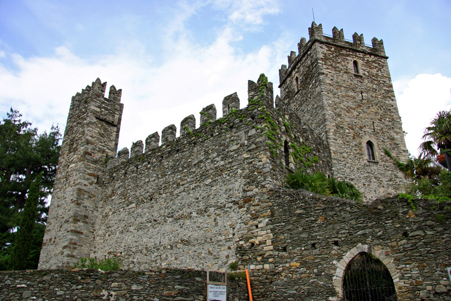 Il Castello di Rezzonico, presso la frazione Santa Maria del comune di San Siro (CO)